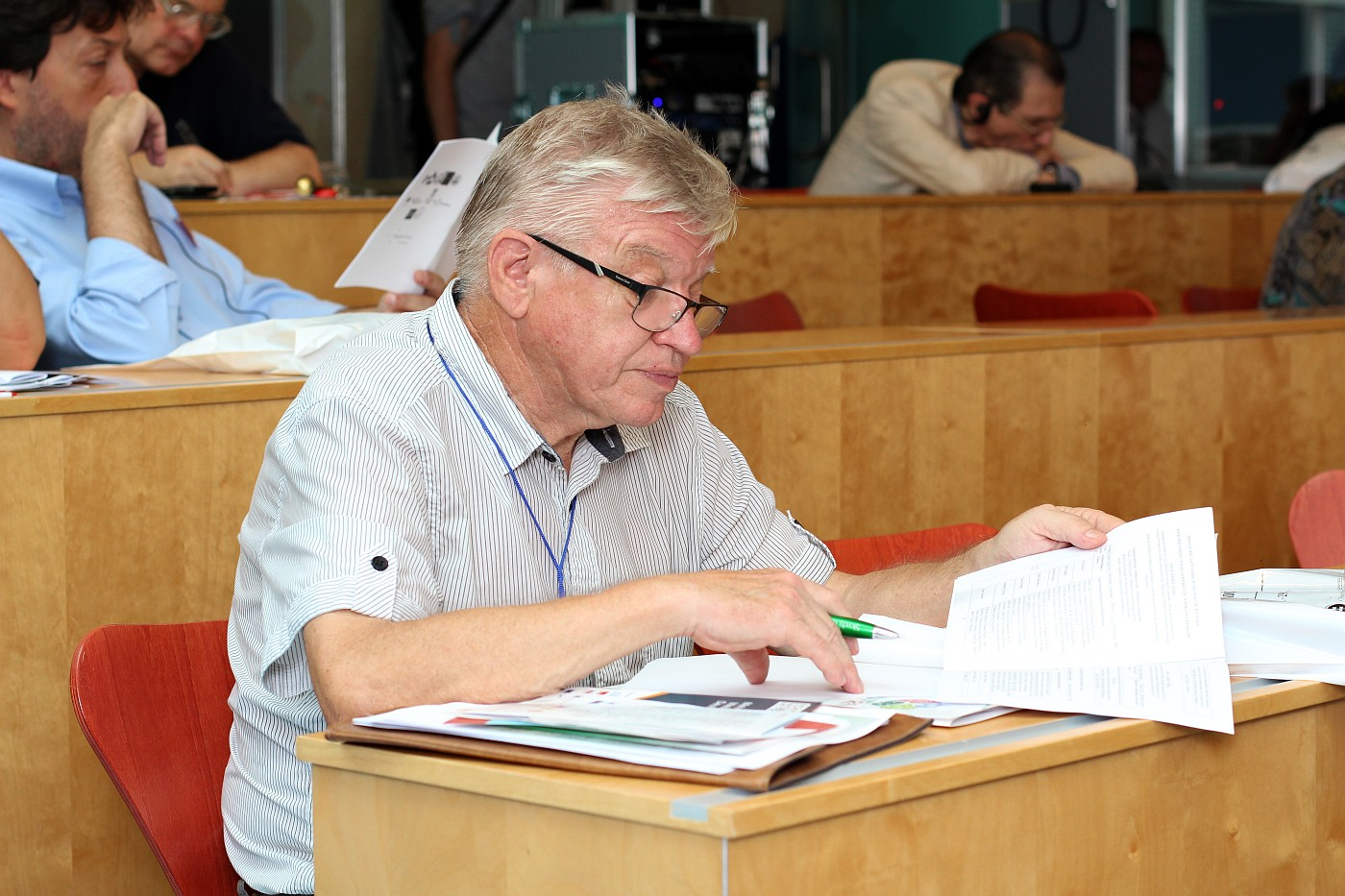 Stanislav Košecký dum lingvopolitika konferenco de la 101-a UK